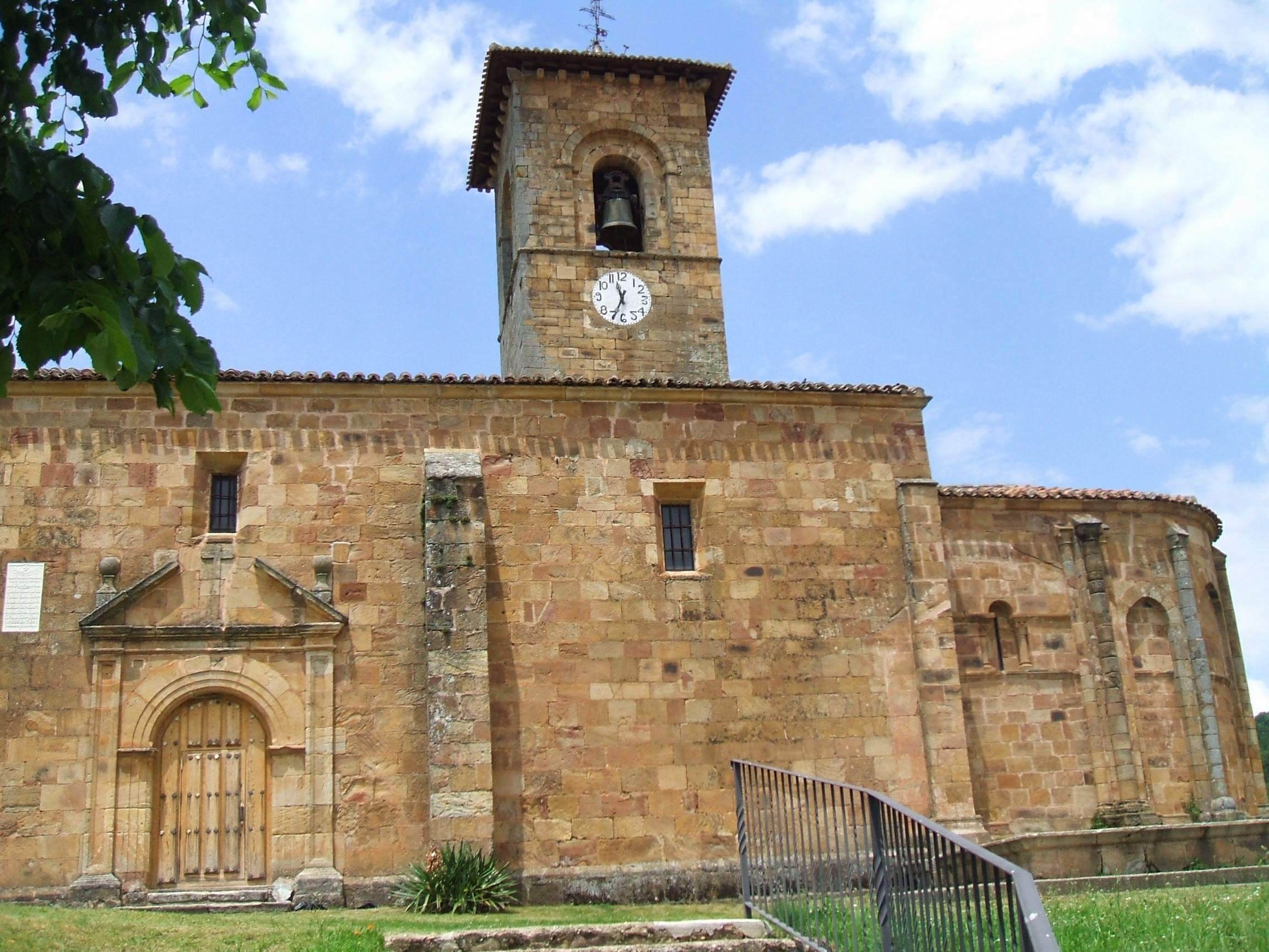 Riocavado de la Sierra (Burgos) - Iglesia de Santa Columba